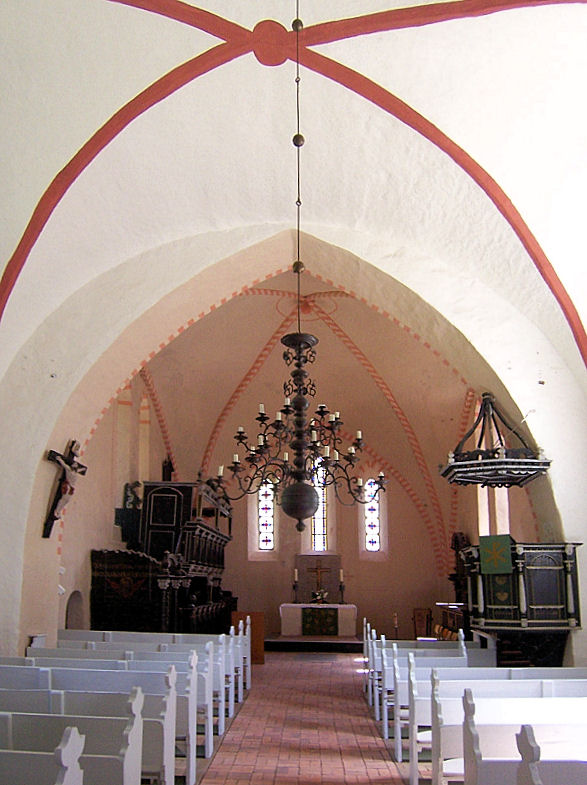 Kirche in Zittow innen, Landkreis Parchim